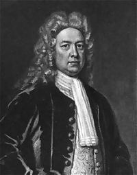 Thomas Pitt. 1600-talsmålning